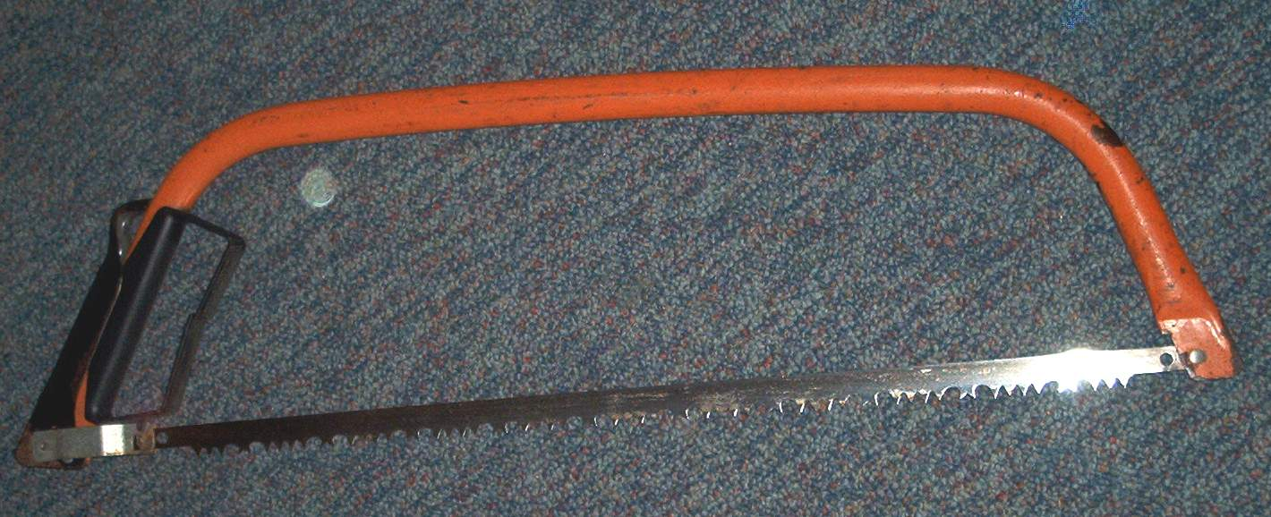 Eénhands beugelzaag voor takken. zelfgemaakte foto voor het publiek domein. Martink